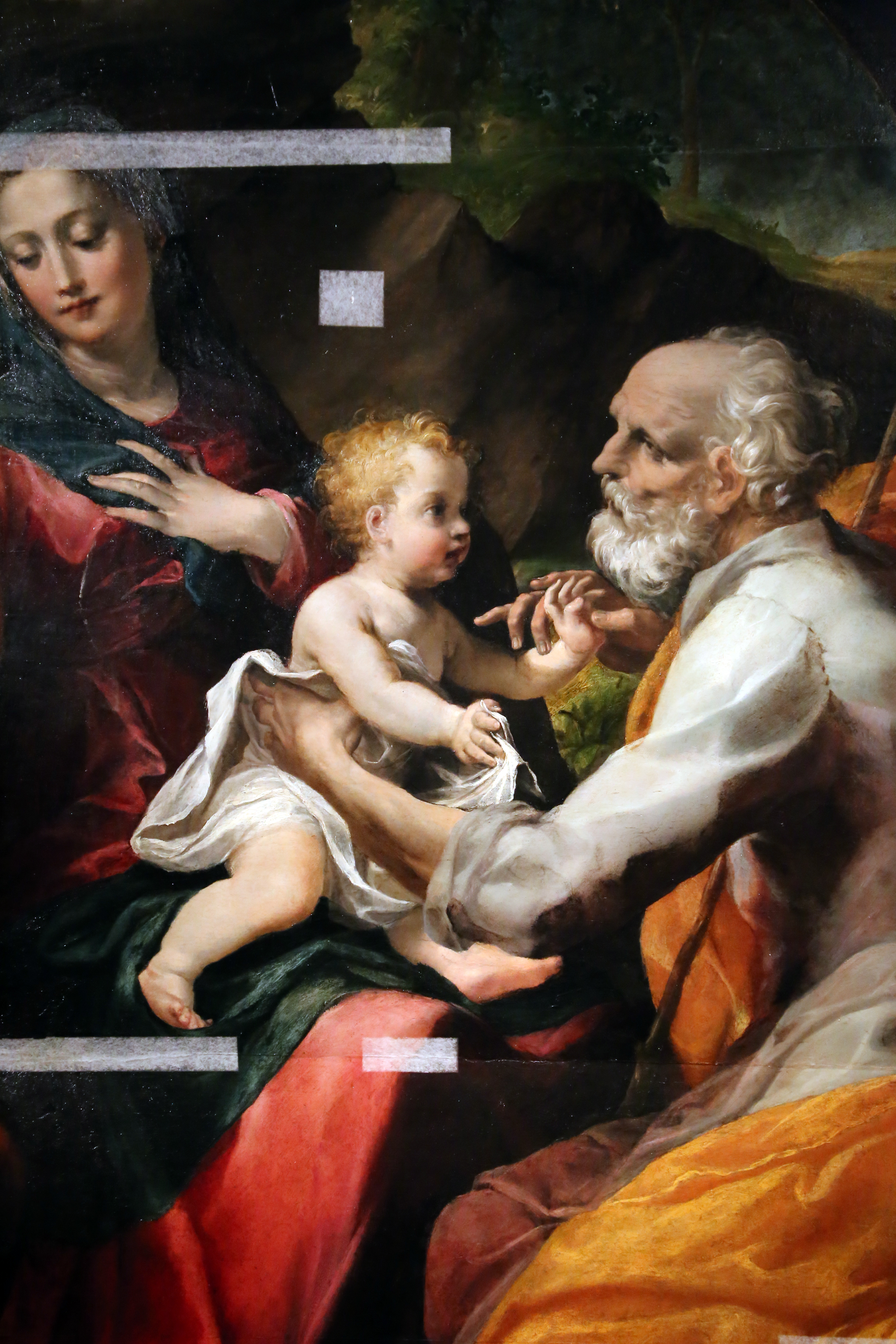 Galleria Nazionale This is a photo of a monument which is part of cultural heritage of Italy.